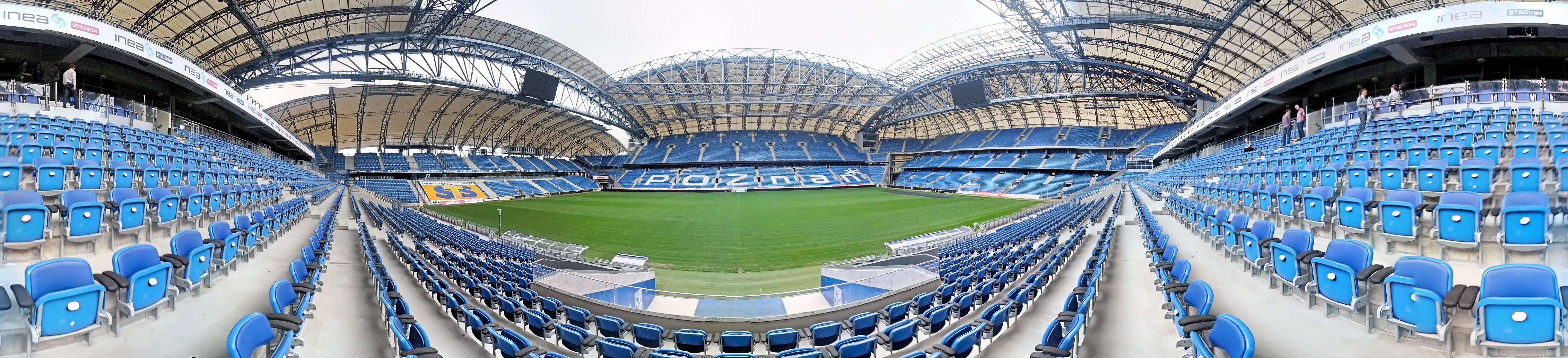 Panorama 360°, Stadion Miejski w Poznaniu, Polska